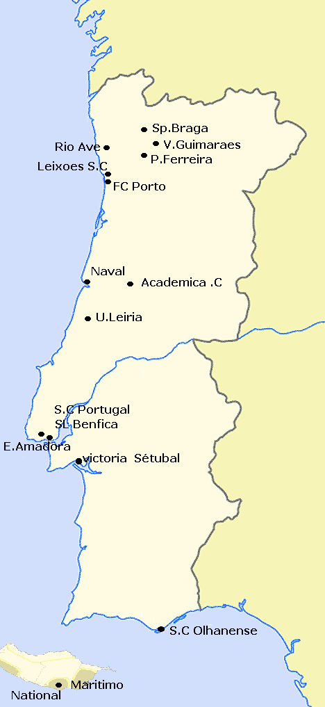 carte du portugal